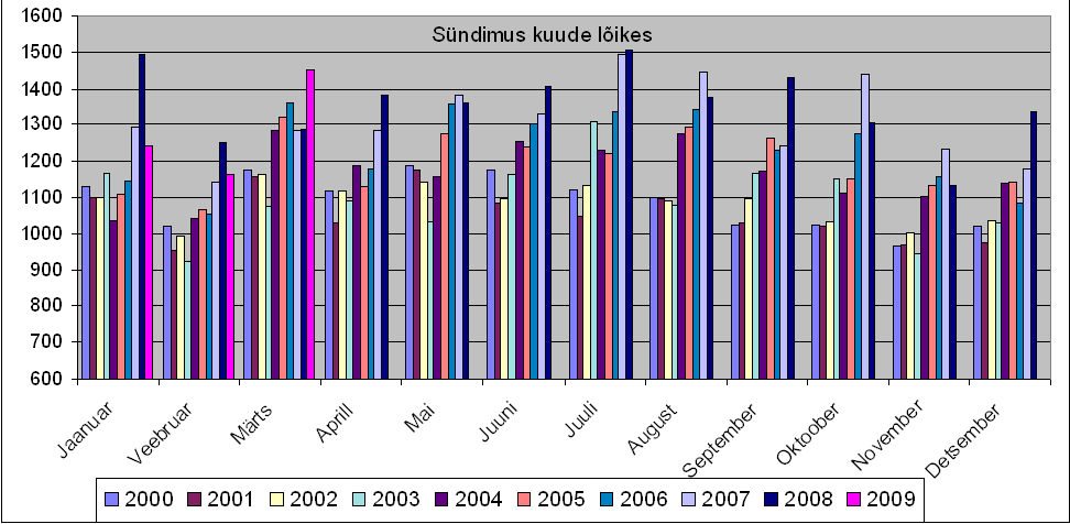 Sündimus 2000–2009, andmed saidilt